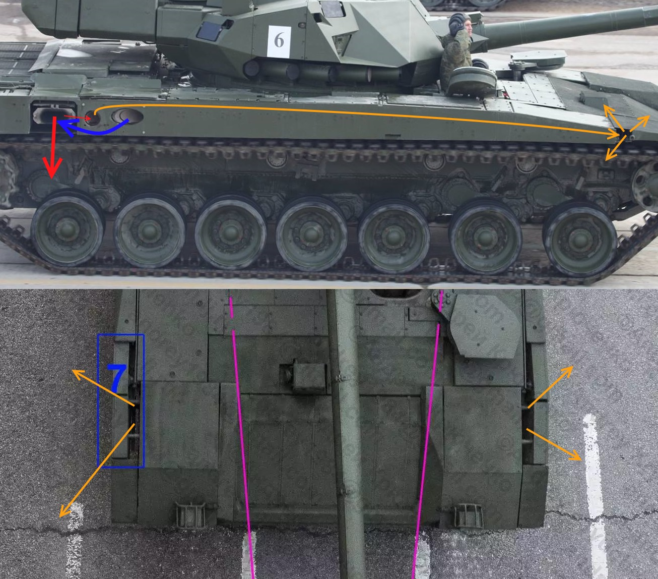 Система подделки сигнатуры Афганитом